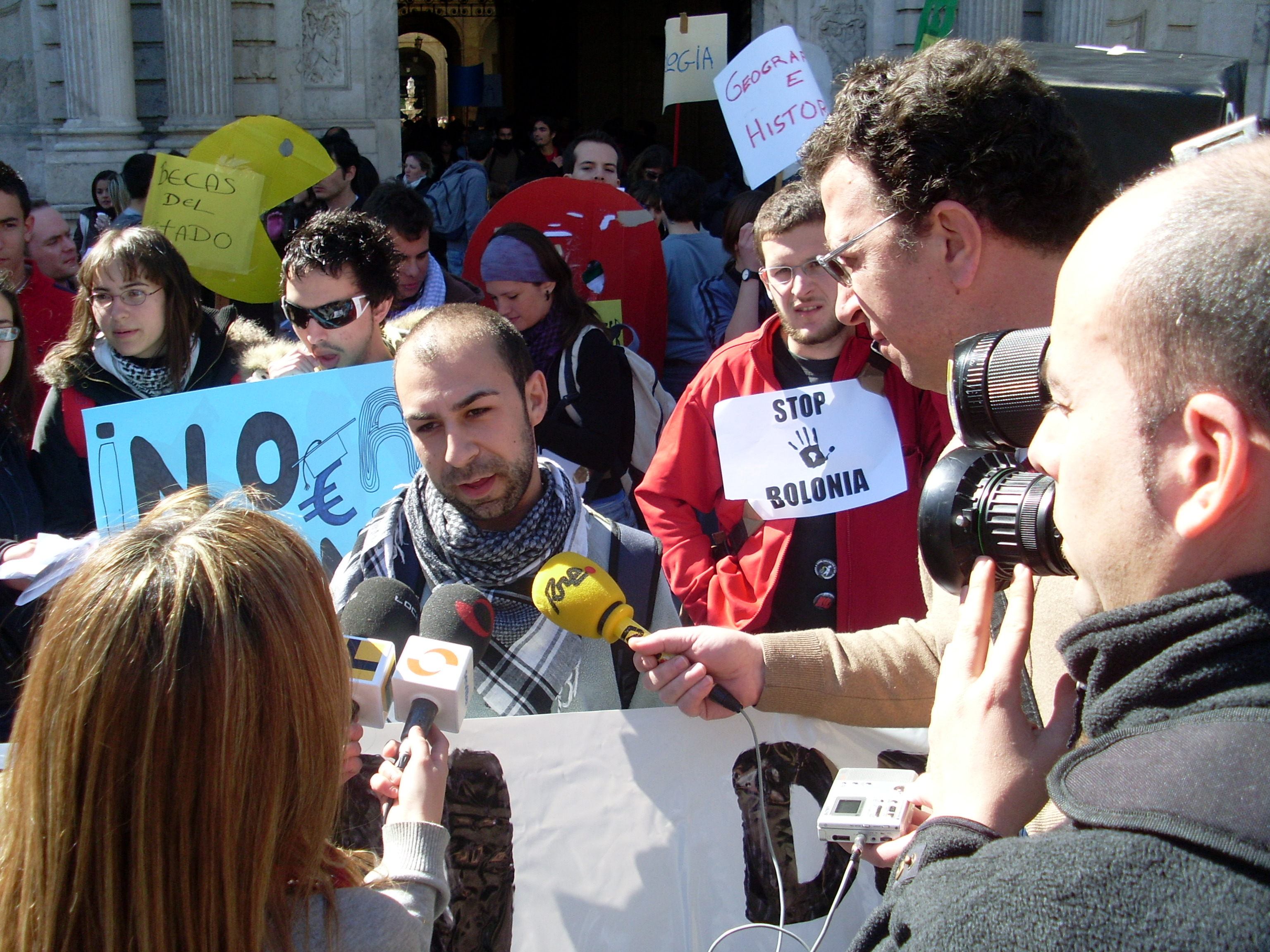 Estudiante entrevistado por los medios de comunicación nacionales antes de una de las movilizaciones contra los planes de Bolonia. Primavera de 2008. Lugar: Puerta del Rectorado de la Universidad de Sevilla.